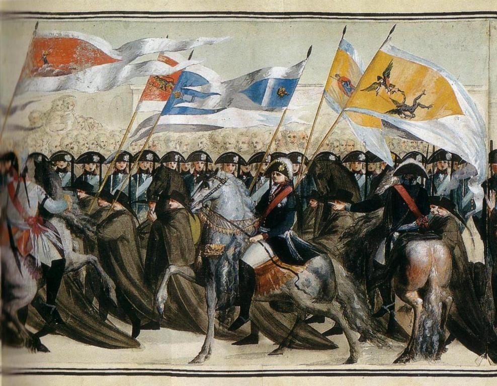 Вторичные похороны Петра III, 2 декабря 1796 г. Составить представление о том, как выглядела траурная процессия мы можем по ее изображению, сделанному неизвестным (по всей вероятности, итальянским) художником. Изображение это представляет собой рулон длиной 15,8 м и шириной 0,75 м. За ними строй трубачей, и на первом плане верхом, за фигурами двух конных адьютантов, фельдмаршал князь Н. В. Репнин, которому было поручено командование всеми войсками, участвовавшими в церемонии.